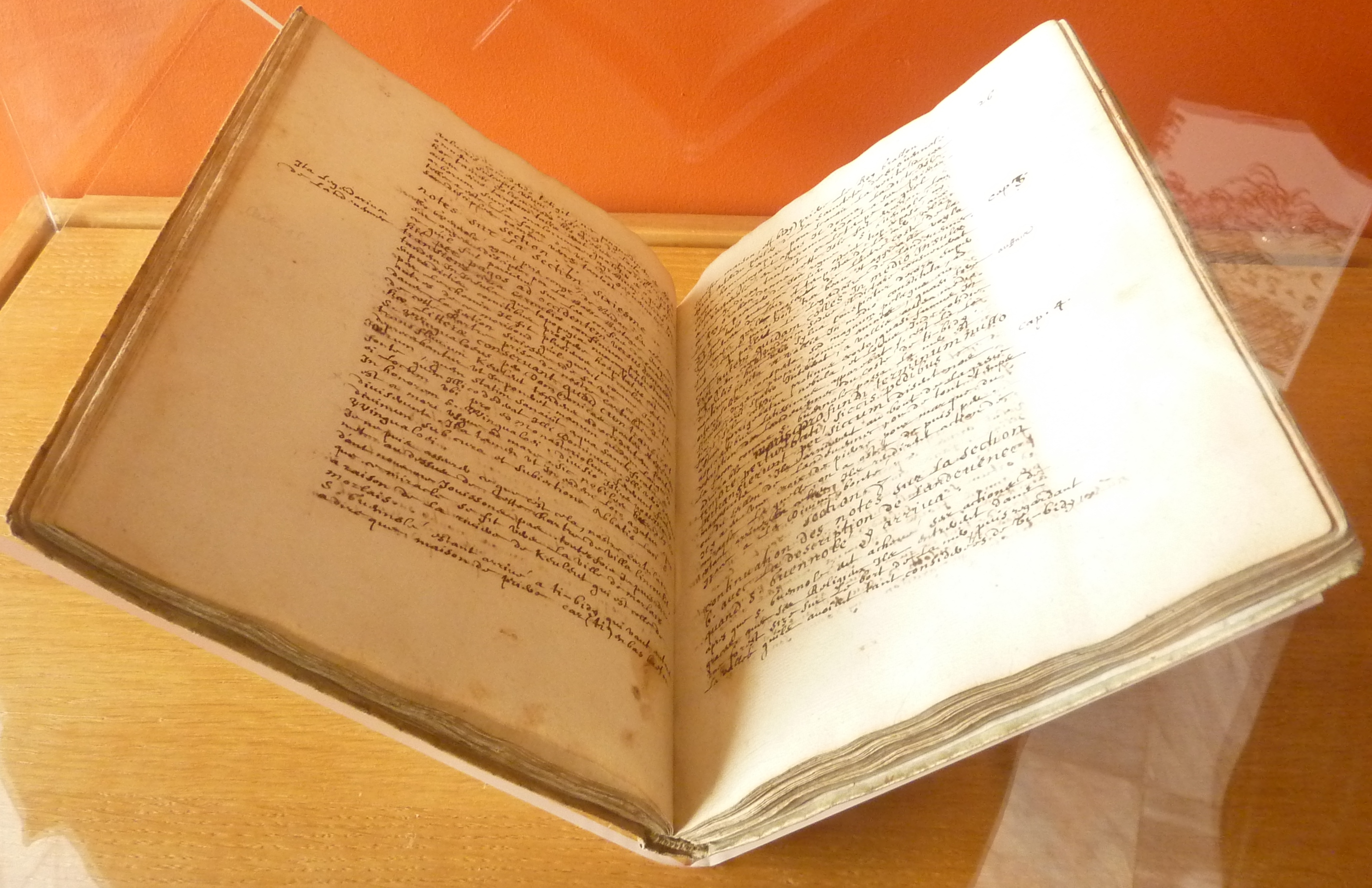 Deux pages du livre de Dom Noël mars (1612-1702) "Histoire du monastère royal Saint-Guénolé de Landévennec" publié en 1648 (Communauté des bénédictins de l'abbaye Saint-Guénolé de Landévennec)